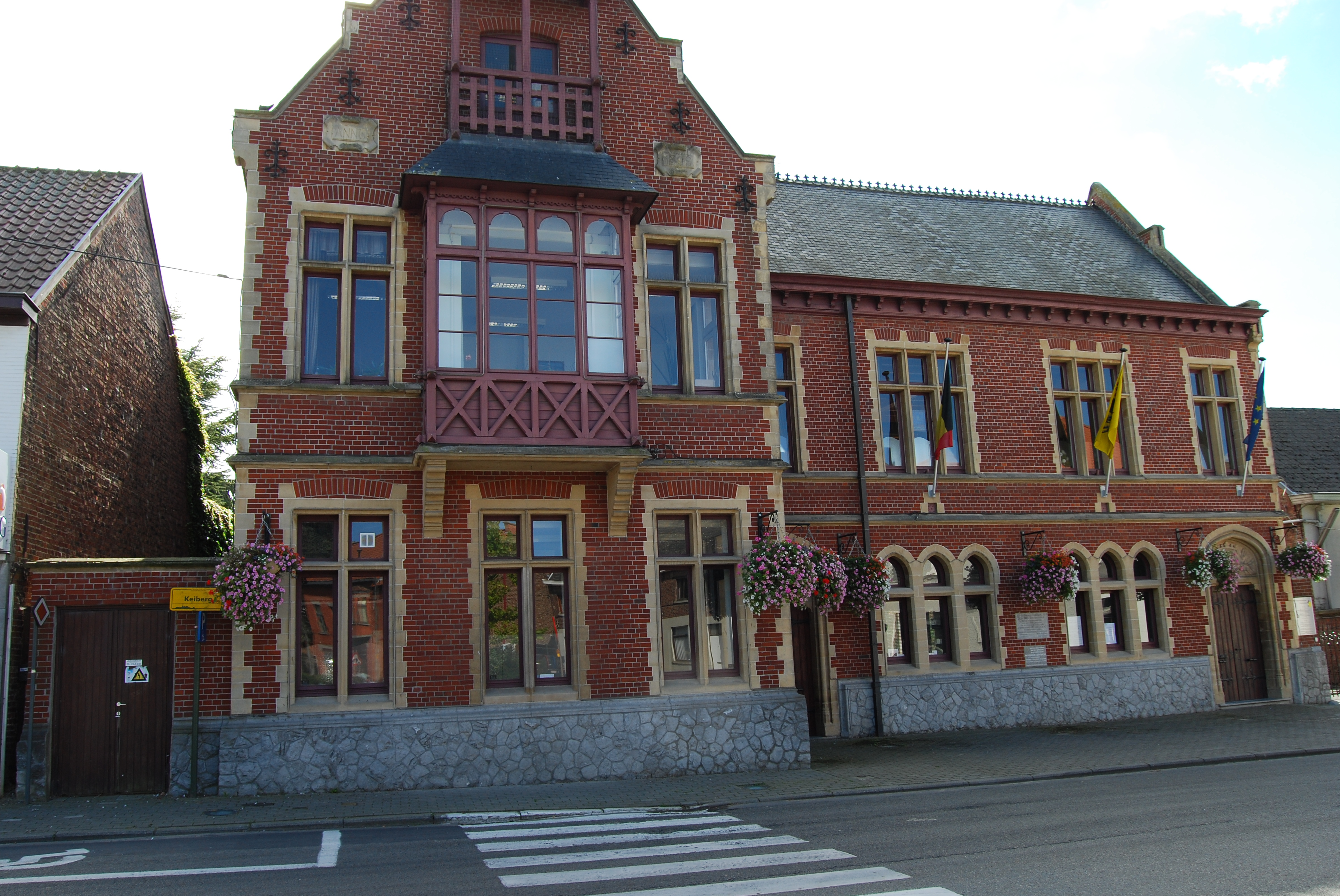 Gemeentehuis en vredegerecht - Foto genomen ter gelegenheid van de fotowedstrijd Wiki Loves Monuments 2012 - België